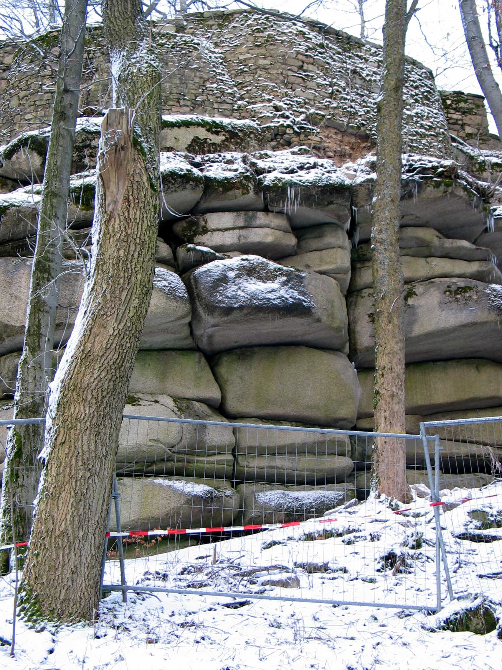 Ein Foto vom zerstörten Mauerteil